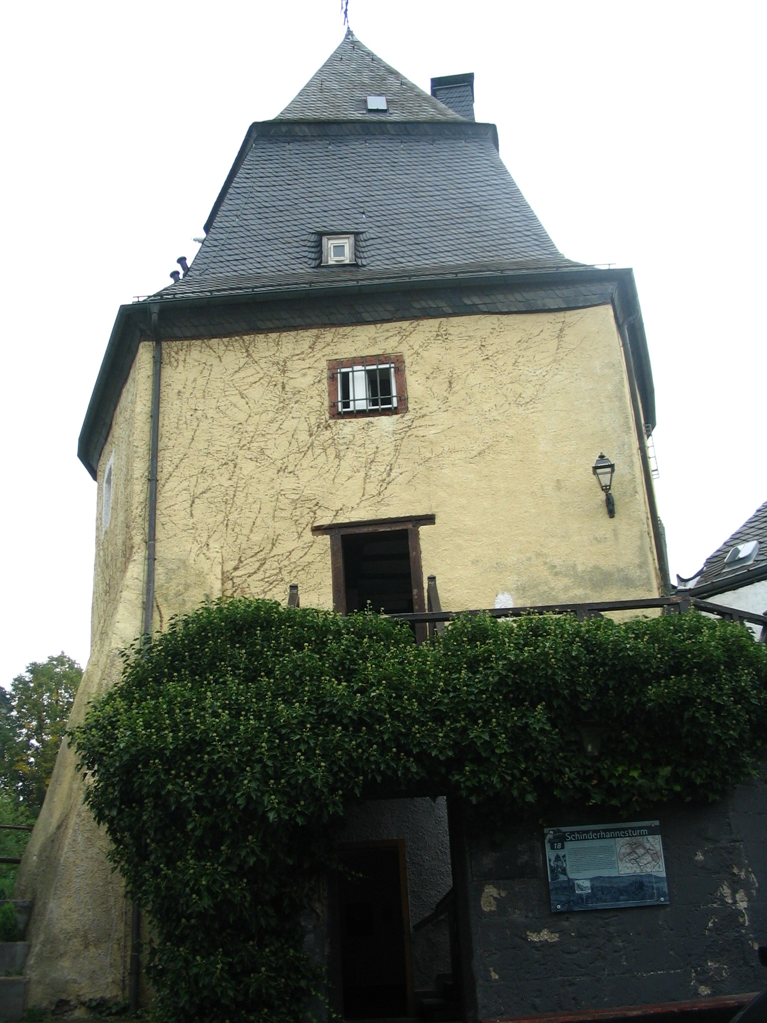 Schinnderhannesturm in Simmern